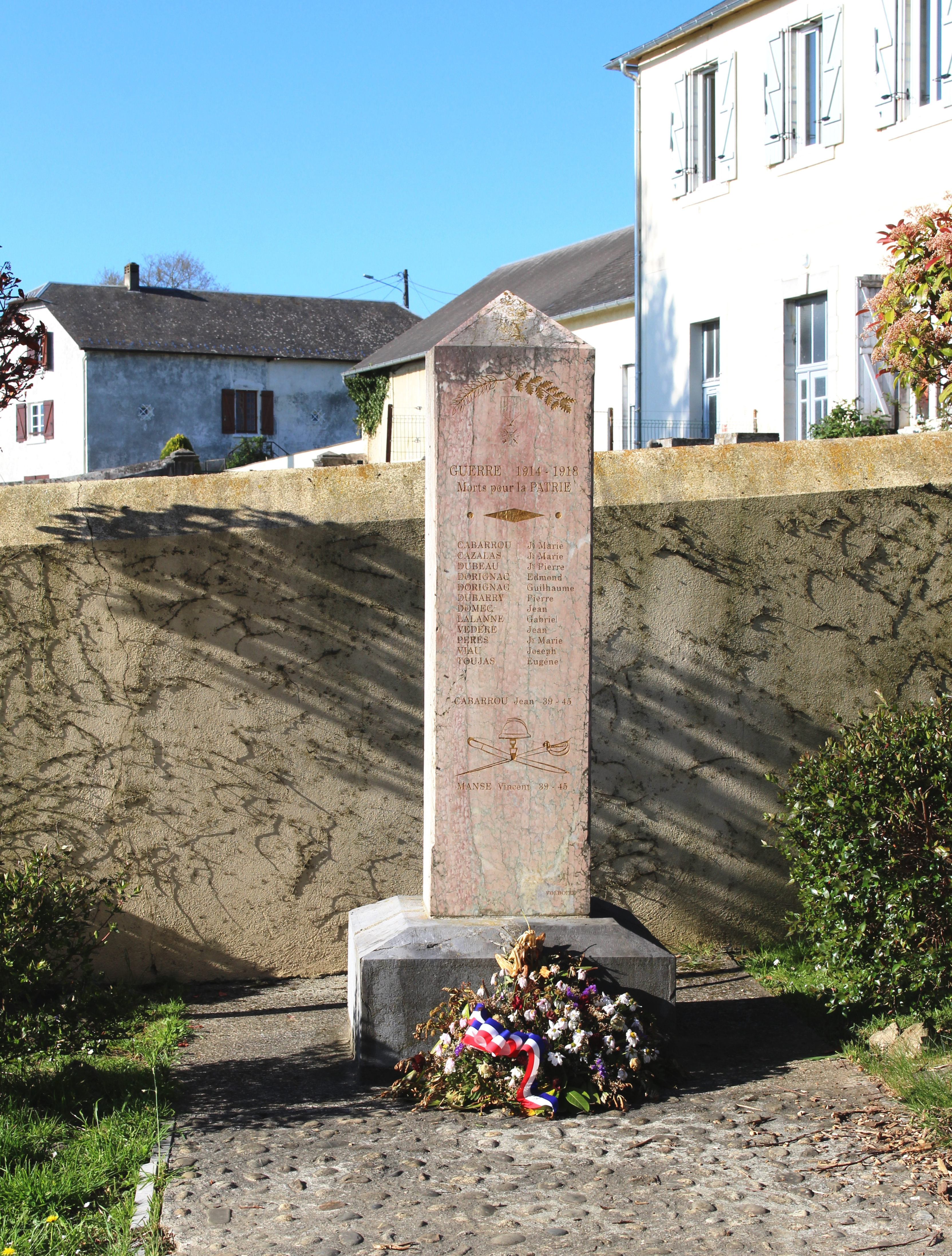 Monument aux morts de Mérilheu (Hautes-Pyrénées)